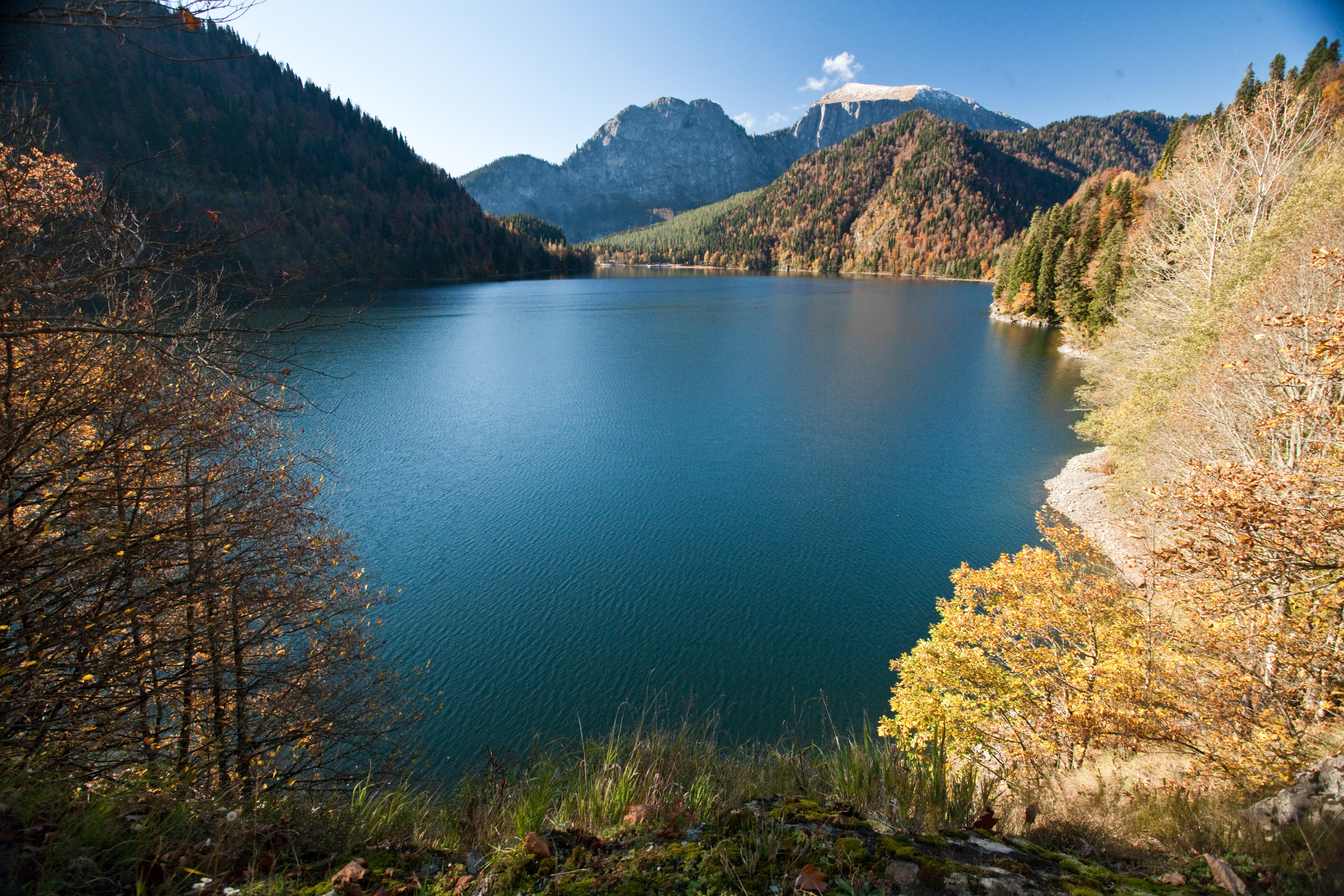 Gagry Abkhazia